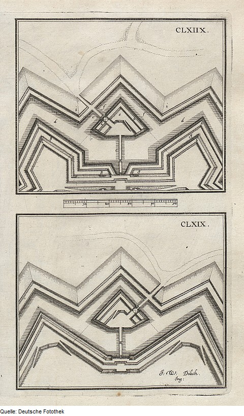 Original image description from the Deutsche Fotothek Architektur & Geometrie & Festungsbau & Ravelin